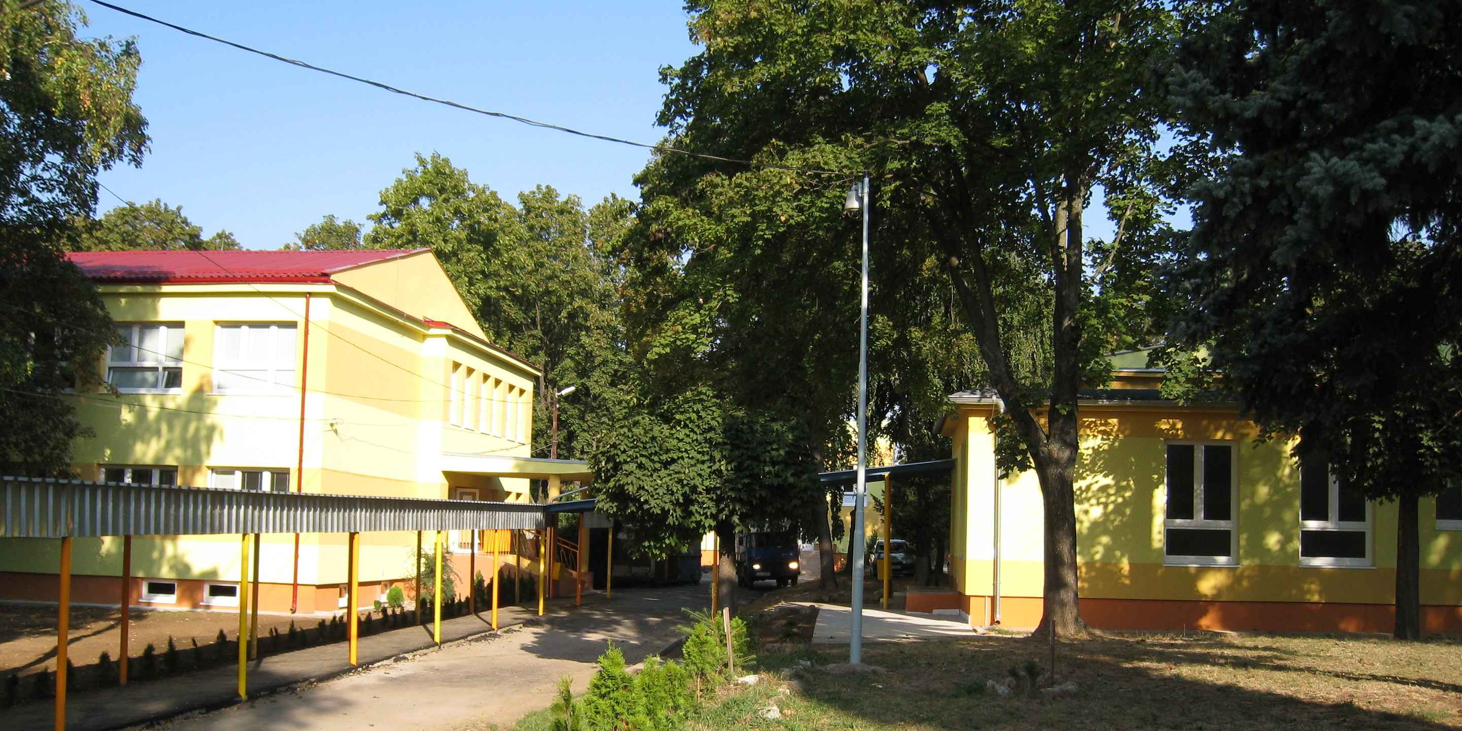 Základná škola Močenok